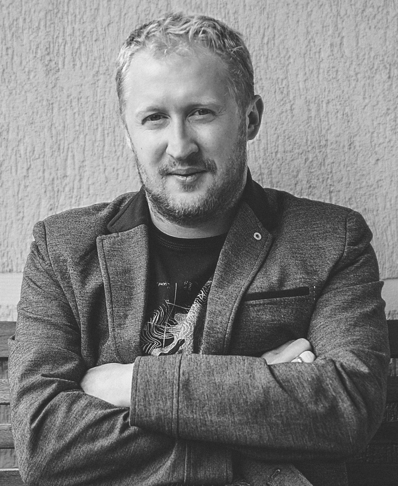 Michał Kozłowski